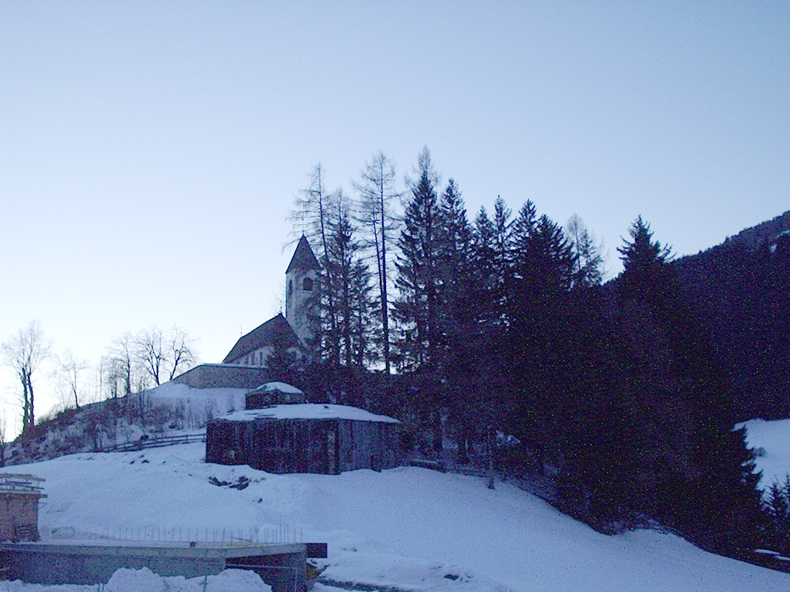 Opera 23 Versciaco, Alto Adige, Italia.